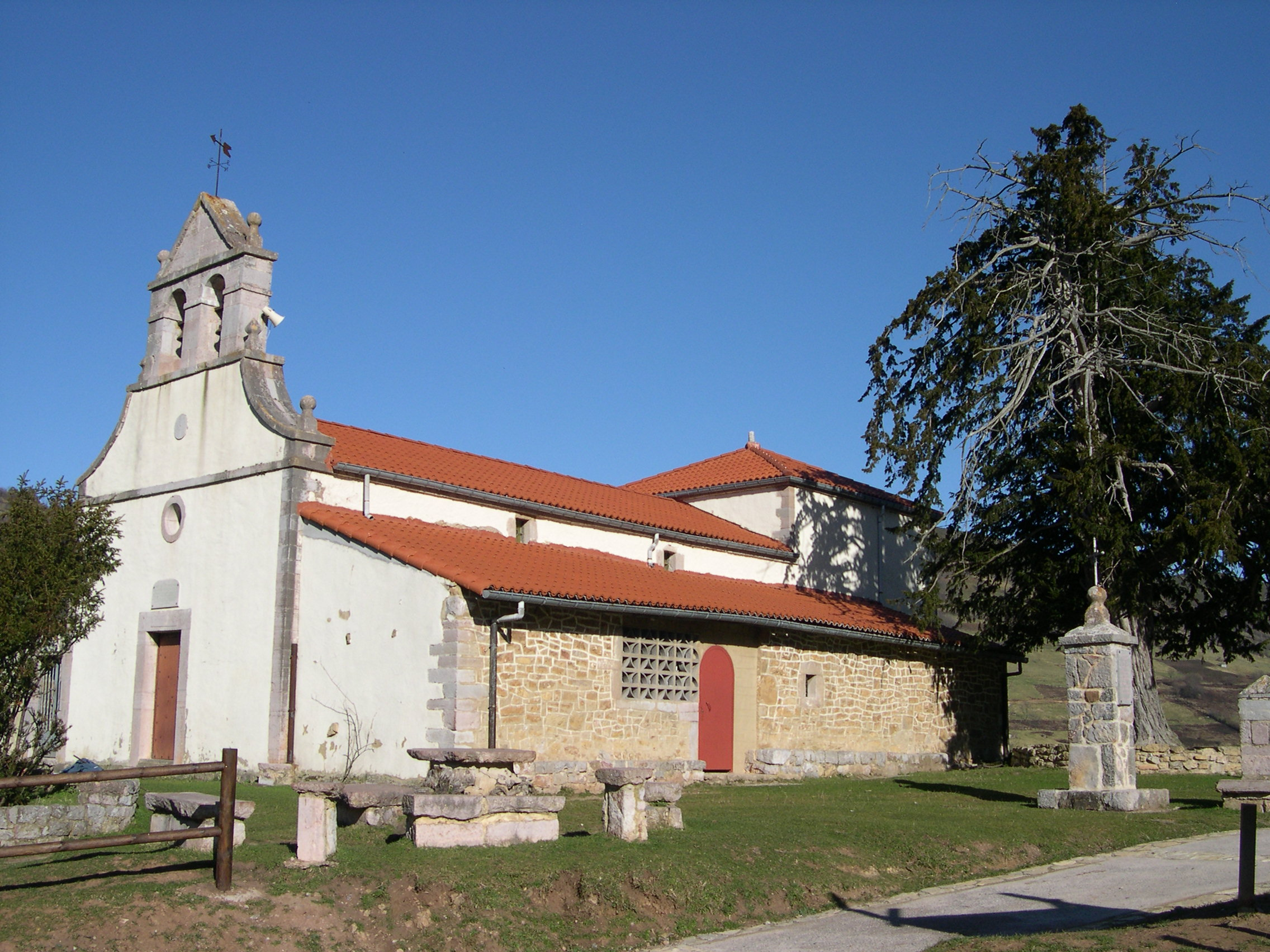 Texu ya Ilesia de Pedroveya, Asturies